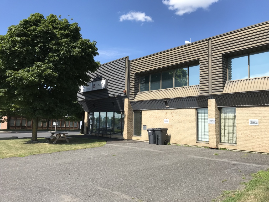 Institut de Théologie pour la Francophonie, Longueuil, Québec